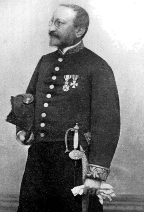 Politicus Mr. Emilius_Henricus_Josephus_Maria_van_Zinnicq_Bergmann\E.H.J.M. Zinnicq Bergmann